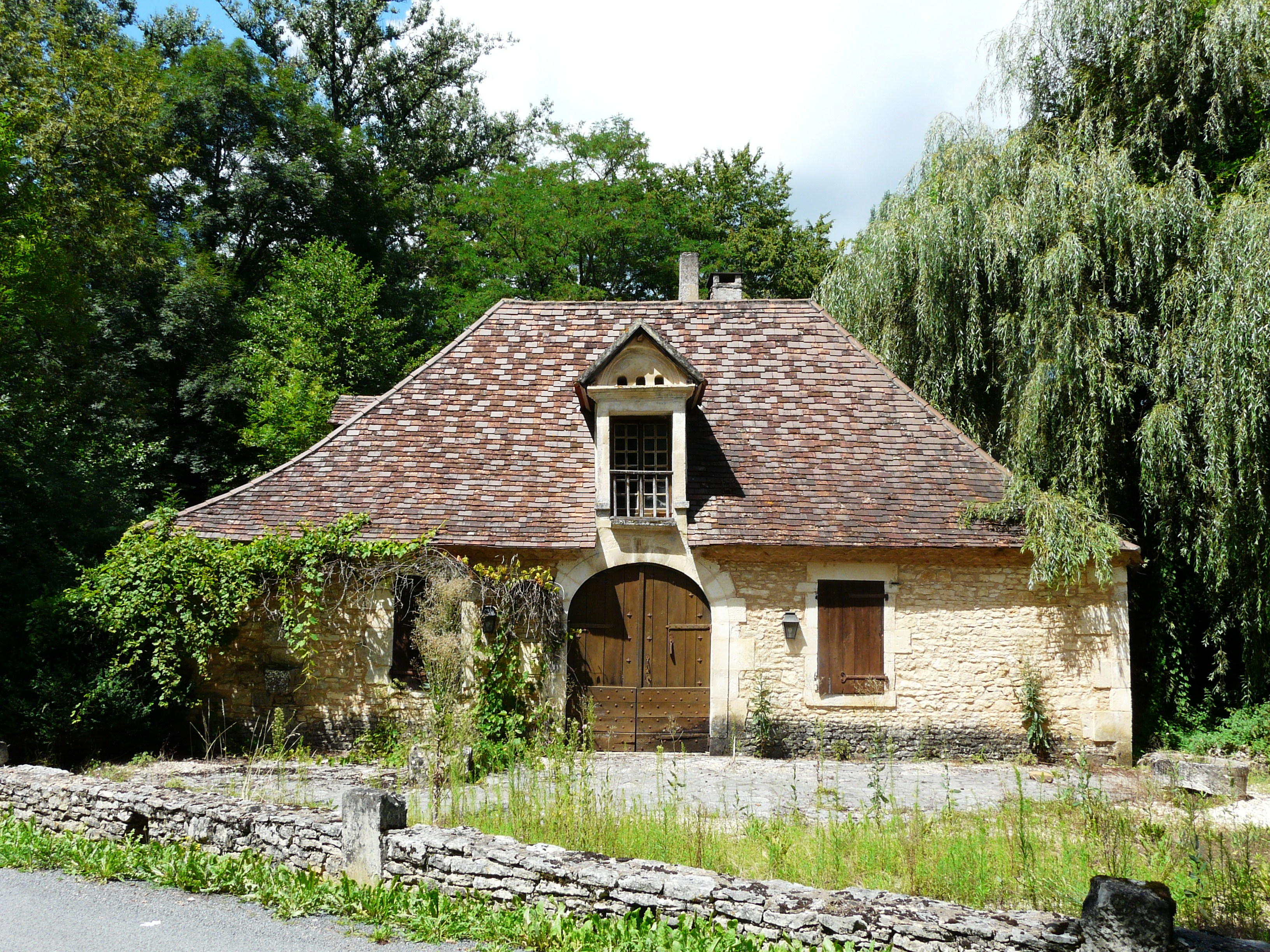 L'ancien moulin à eau des Ormeaux, Sainte-Eulalie-d'Ans, Dordogne, France.